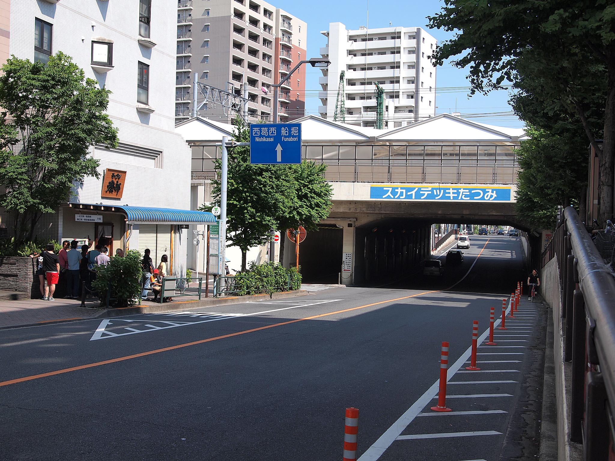 東京都道308号千住小松川葛西沖線・平和橋通り上の新小岩駅北口バス停とスカイデッキたつみを新小岩陸橋側から撮影。